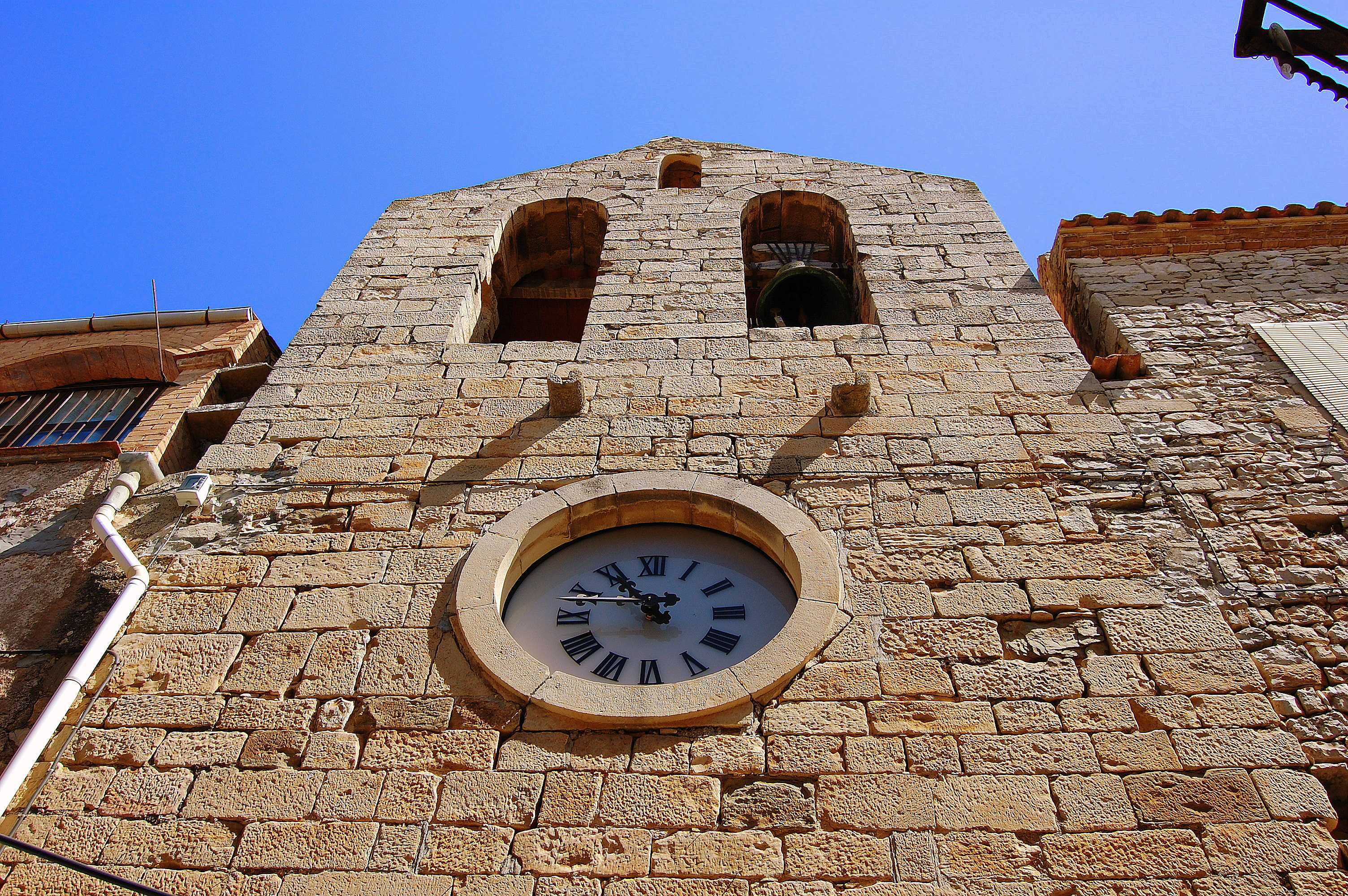 Església de Sant Bartomeu del Mas de Bondia (Montornès de Segarra)